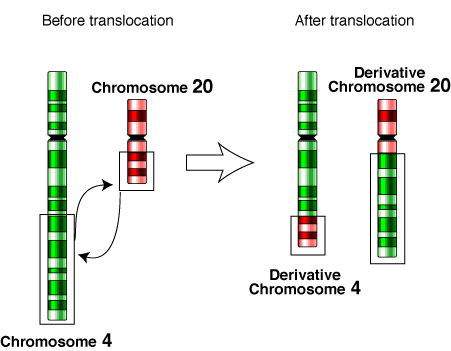 Translocation chromosomique National Human Genome Research (USA)